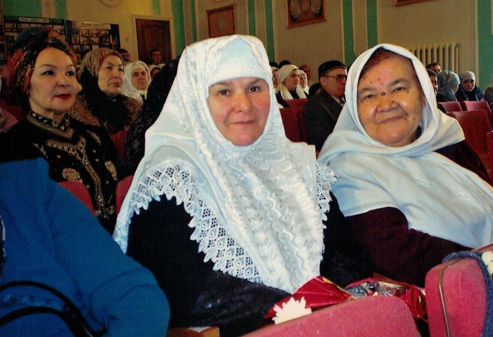 Шағирә Гүзәл Ситдиҡова һәм Маһинур Үтәбай-Кәрими